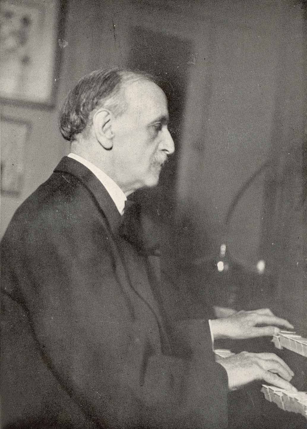 Louis Vierne dans les années 1930. Source : Collectif, In Memoriam Louis Vierne, Paris, Desclée de Brouwer & Cie - Secrétariat Général des Amis de l'Orgue, 1939, 228 p.